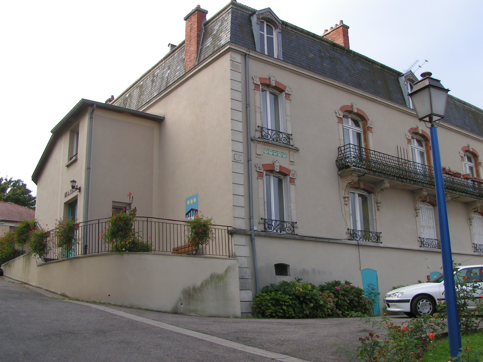 La mairie de Dommartin-lès-Toul, 54200 Meurthe et Moselle